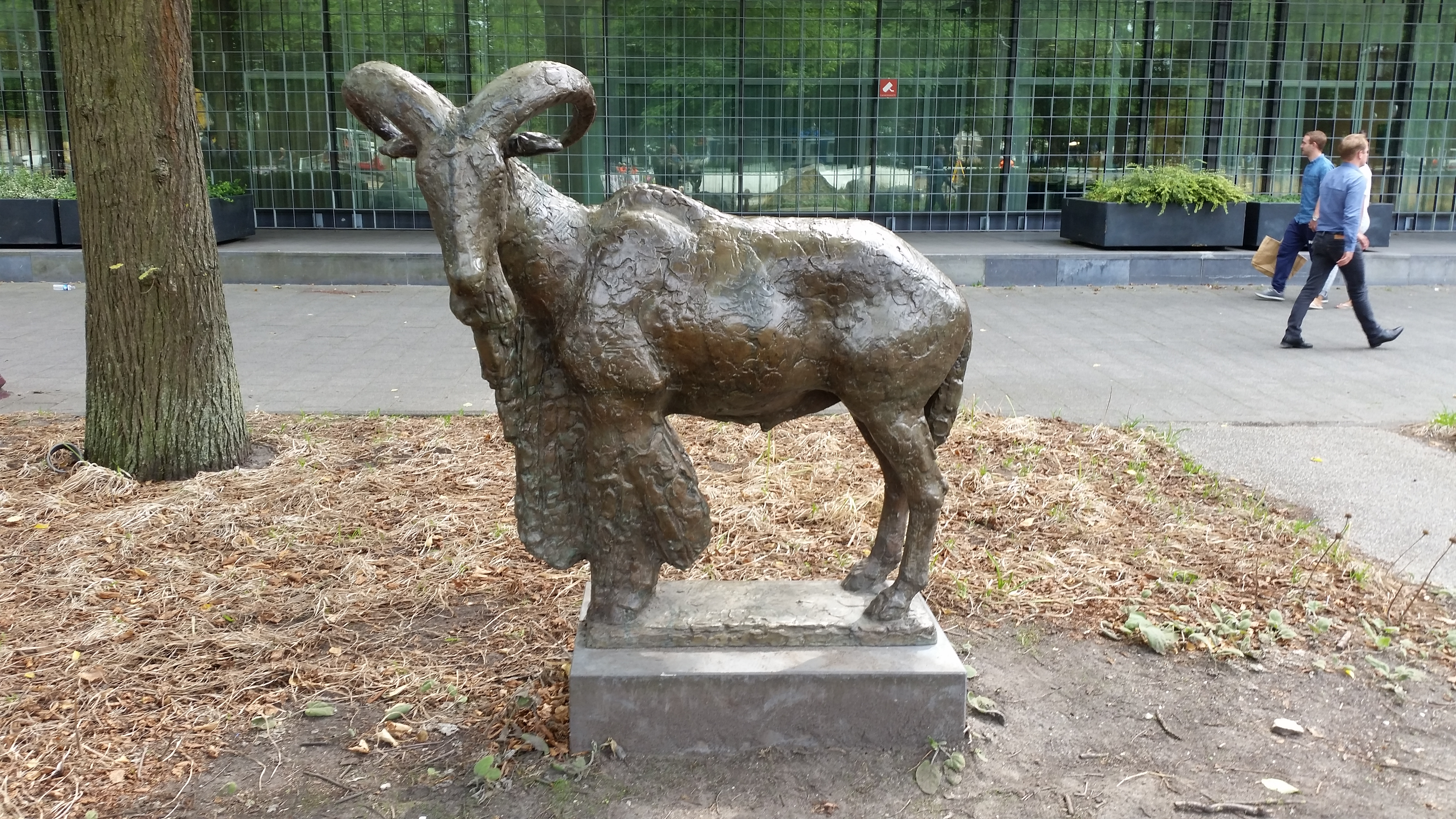 Manenschaap (sculpture), zijaanzicht